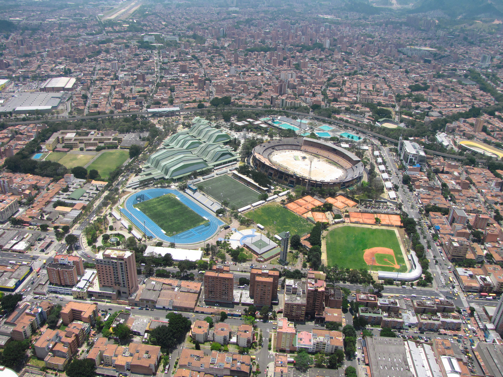 Unidad deportiva Atanacio Girardot - Cutro días antes de la inauguración de los Juegos Suramericanos en Medellín 2010 - Antioquia - Colombia